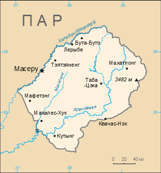 Карта Лесота